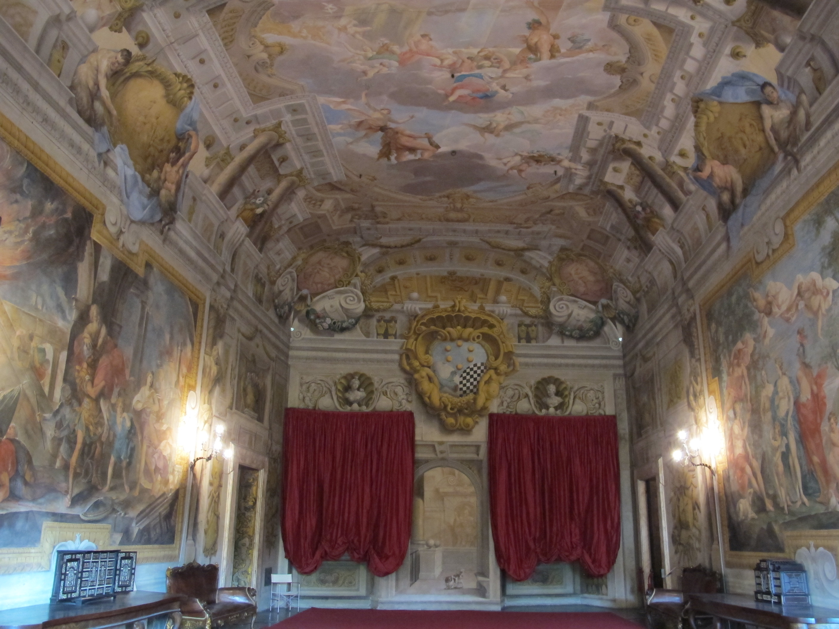 Palazzo mansi, salone